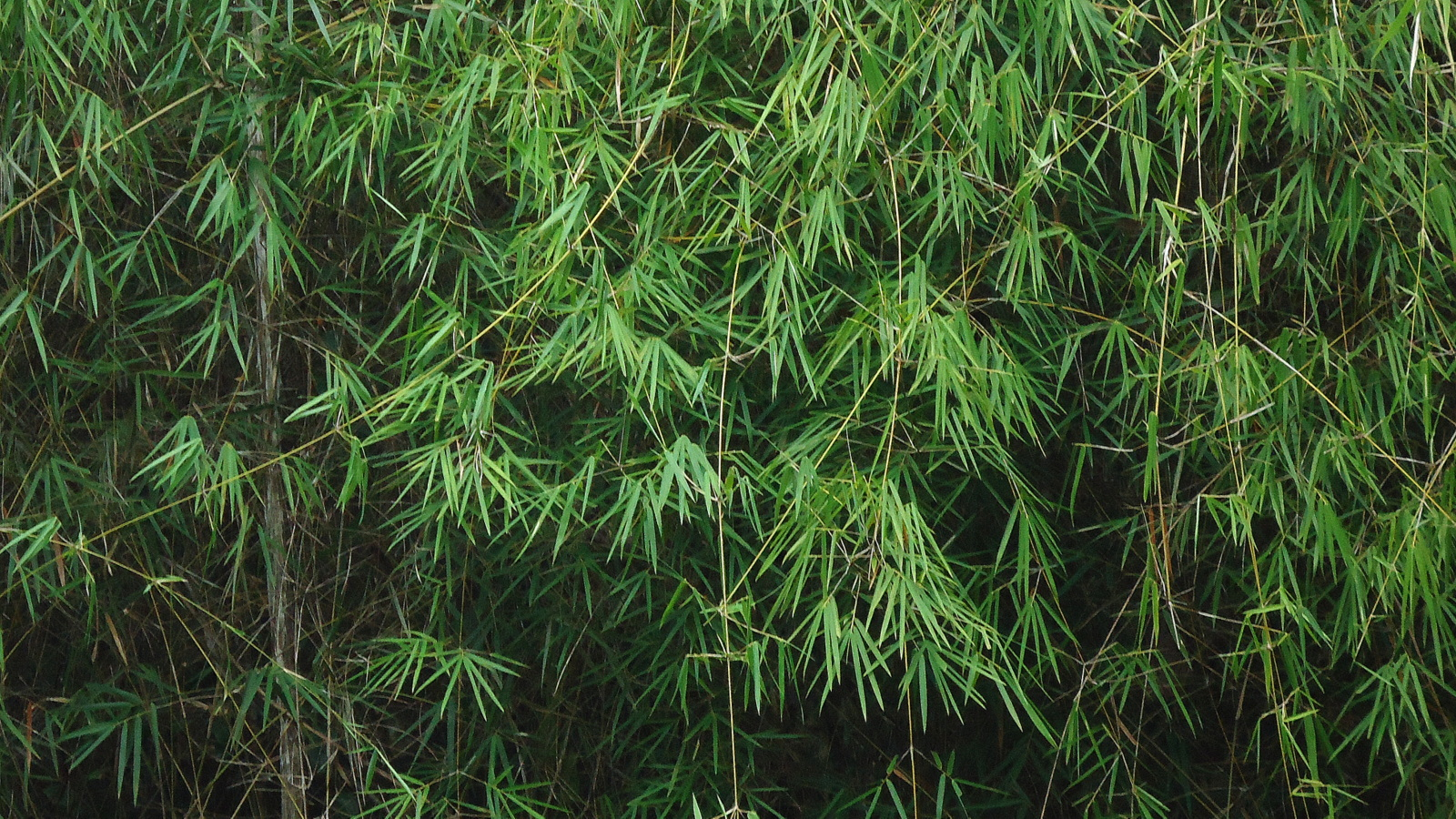 Atractantha falcata